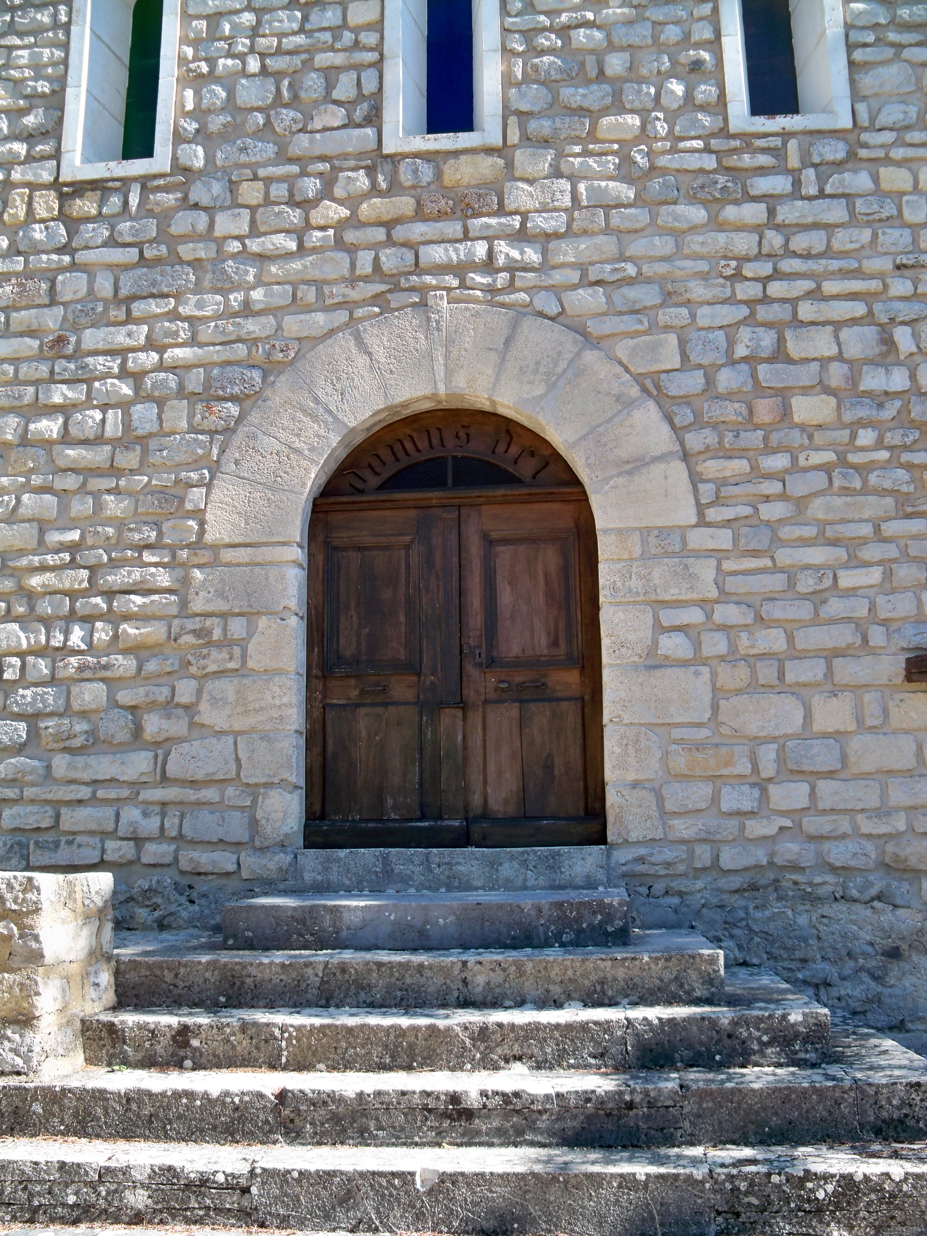 Église de Barret-de-Lioure, (Inscription, 1926) : Portail .